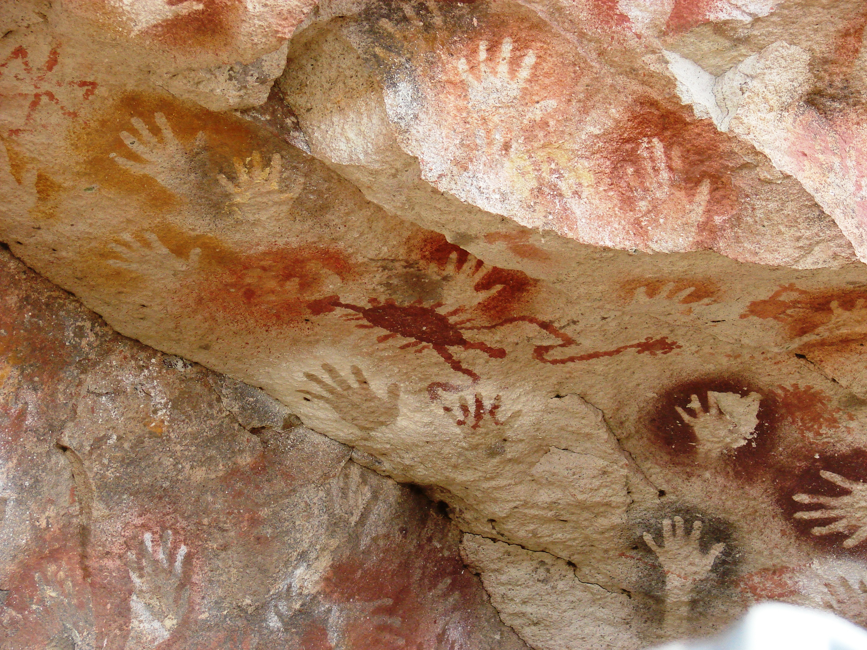 Sitio arqueológico con pintura rupestres